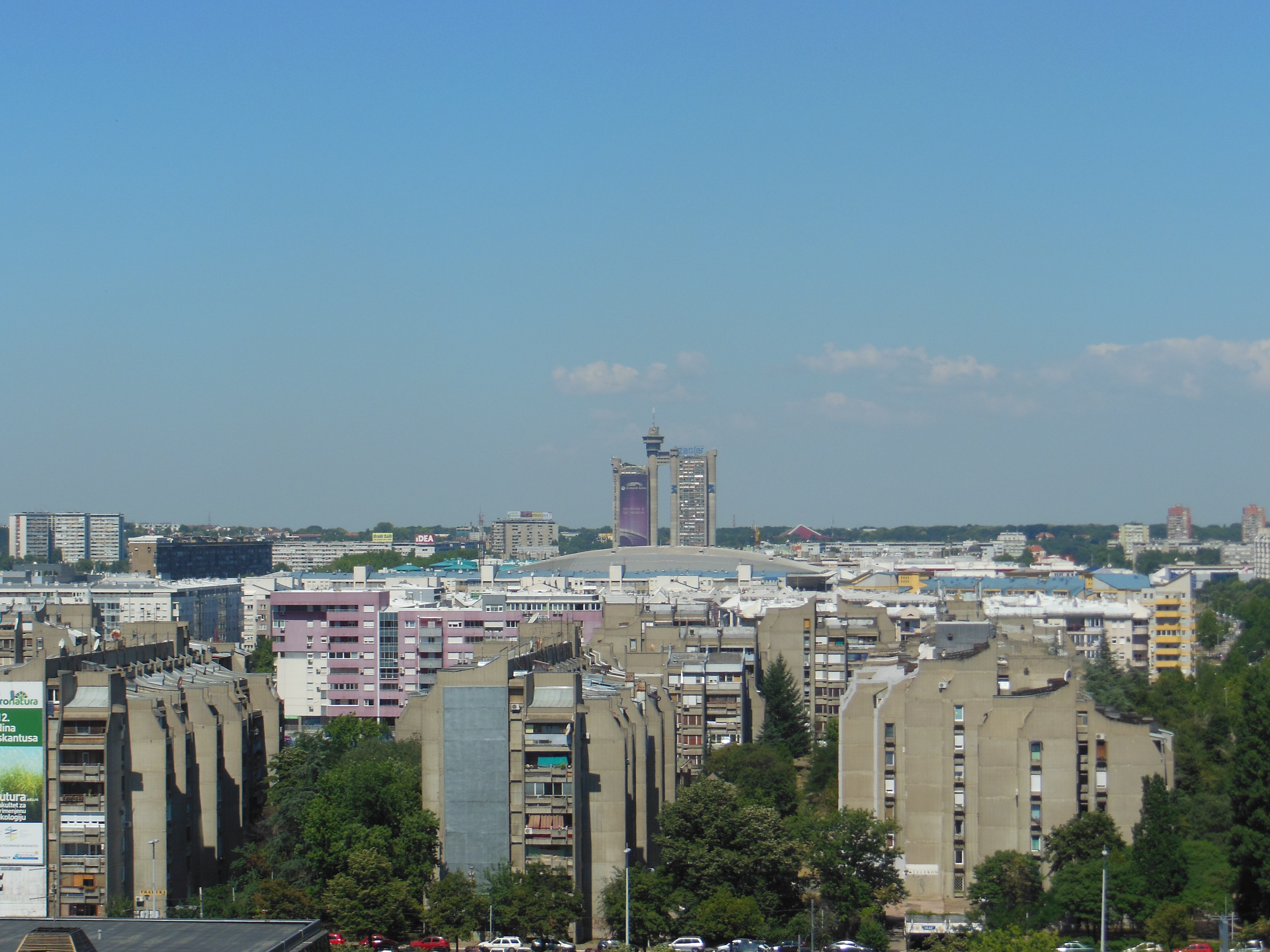 Beograd, 2013/07/23